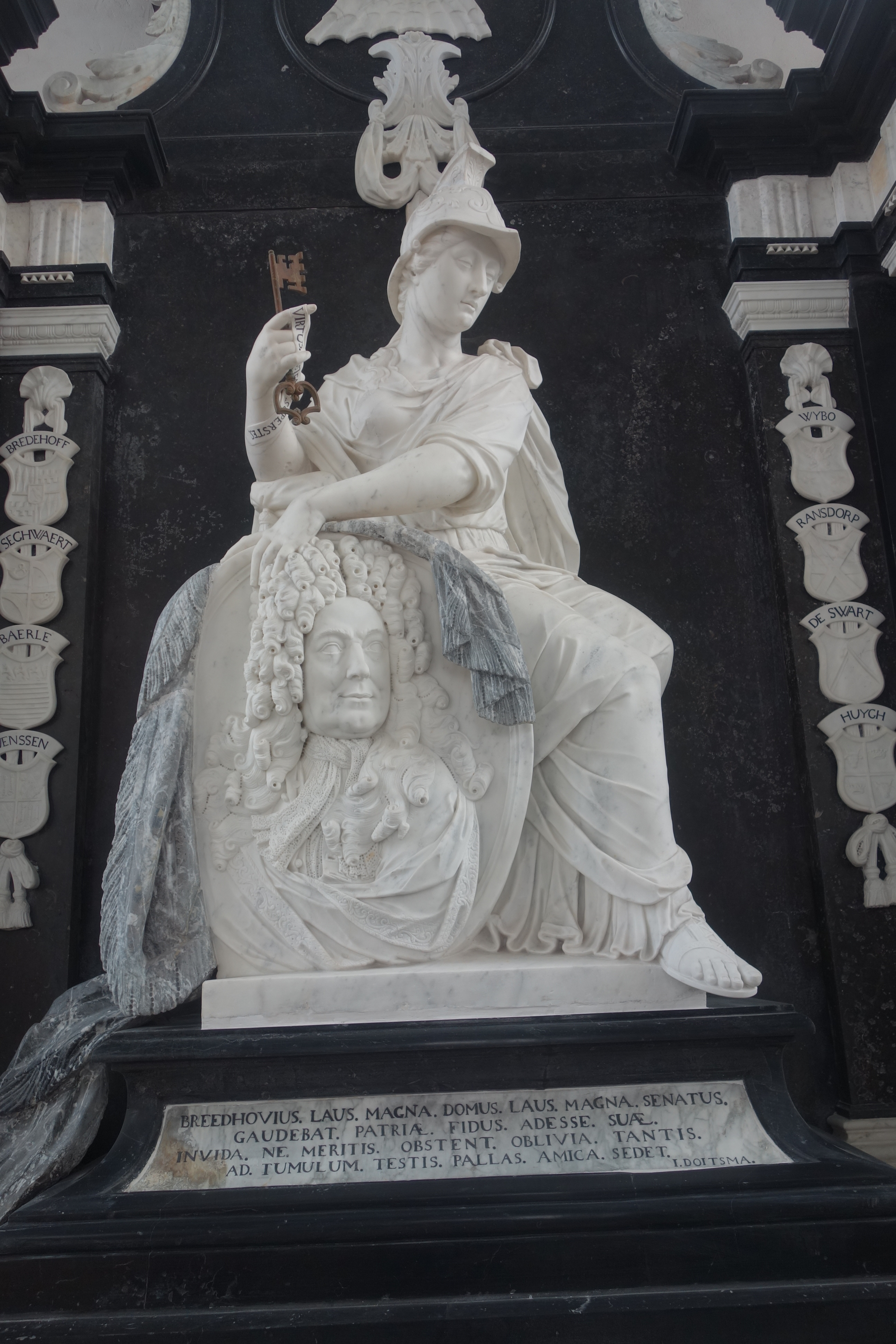 Het beeld van Minerva, hier is goed te zien dat het praalgraf scheef staat, de camera staat vrijwel waterpas. Minerva houdt een medaillon vast met daarop de beeltenis van François van Bredehoff.